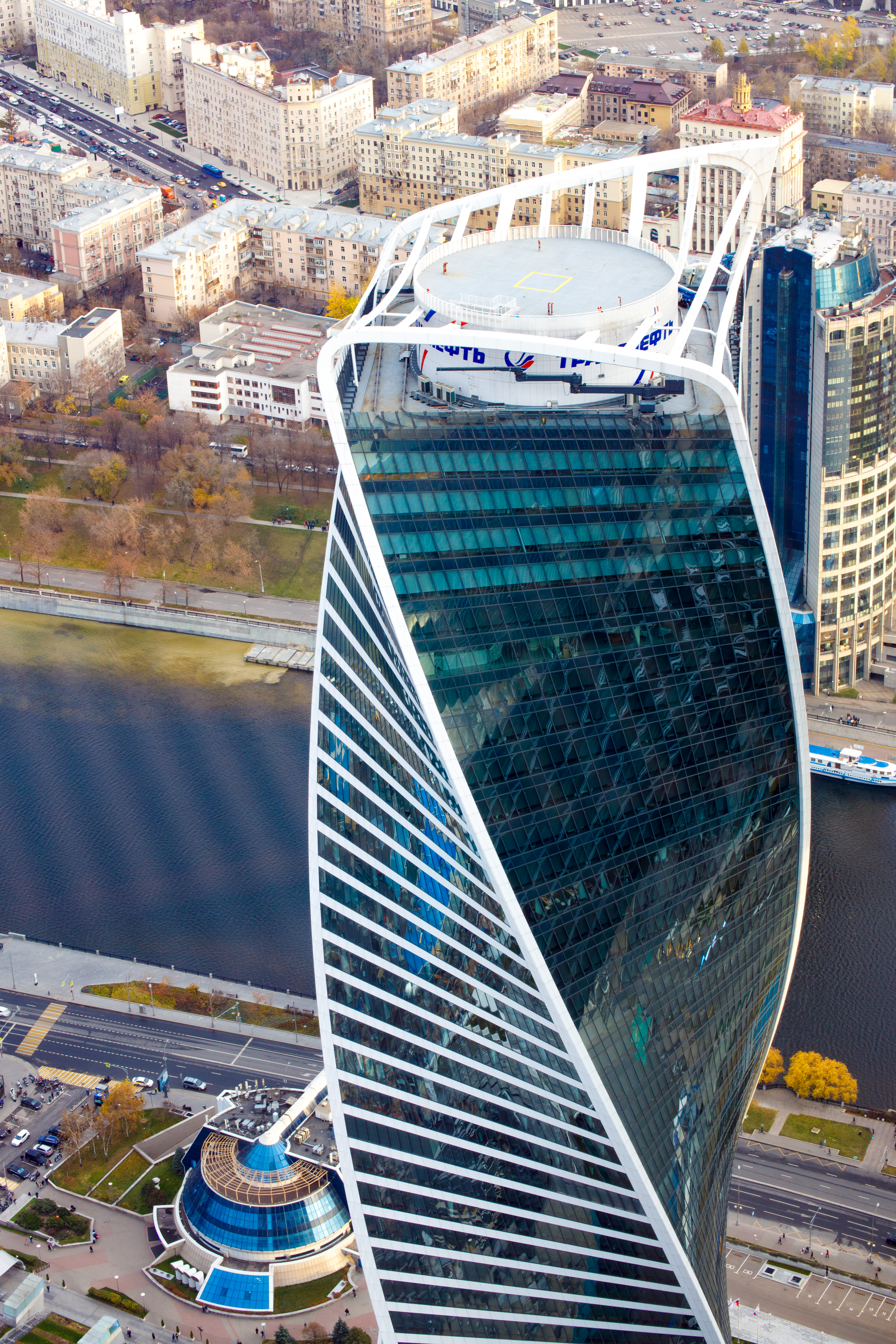 Башня Эволюция днём. Точка съёмки: 90 этаж Башни «Восток» комплекса Федерация